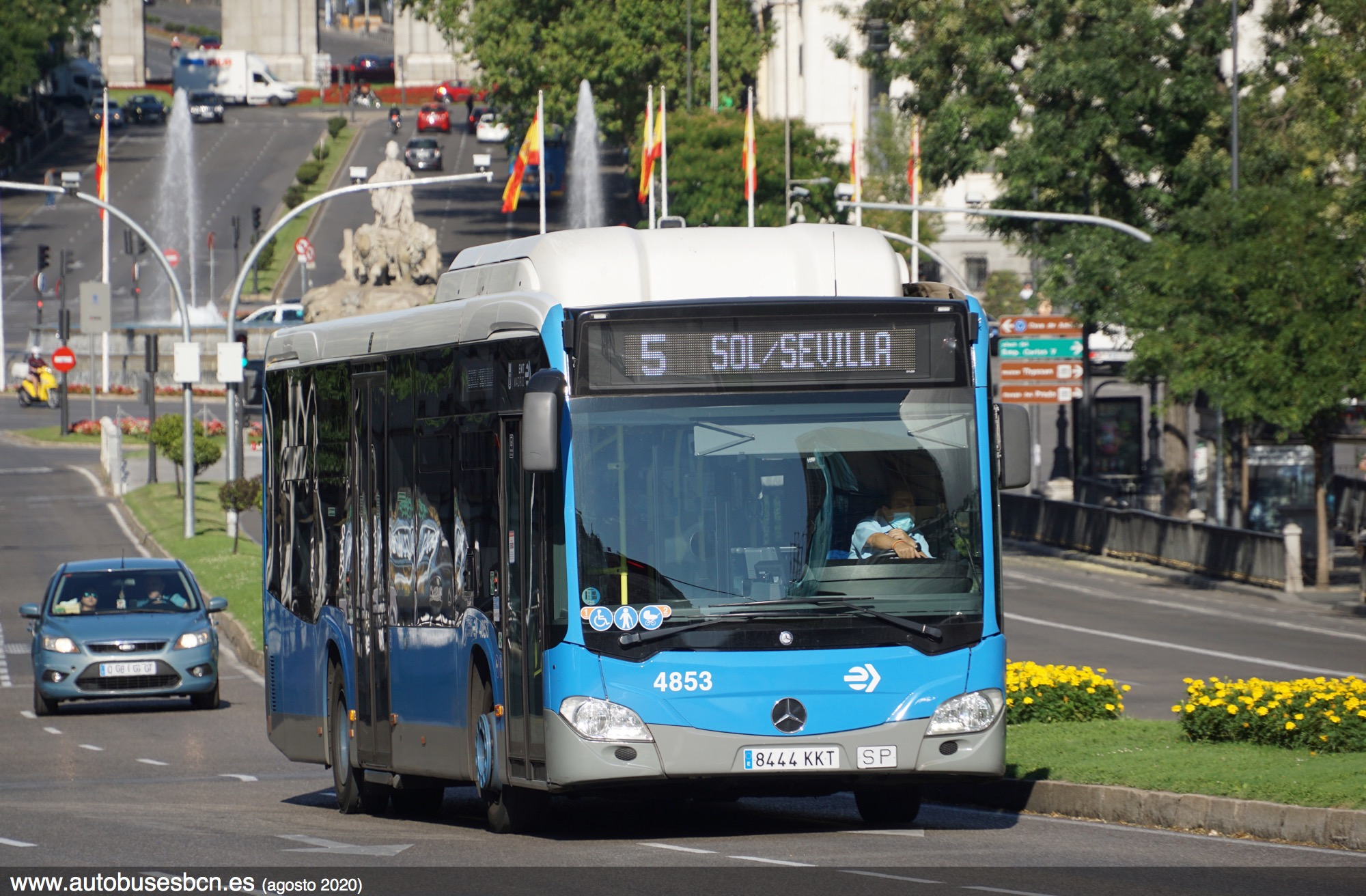 5 EMT Madrid en la calle Alcalá, agosto 2020